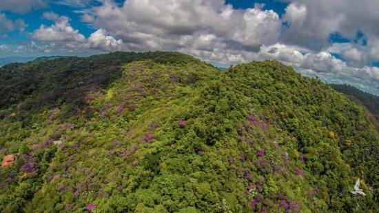 SERRA BONITA